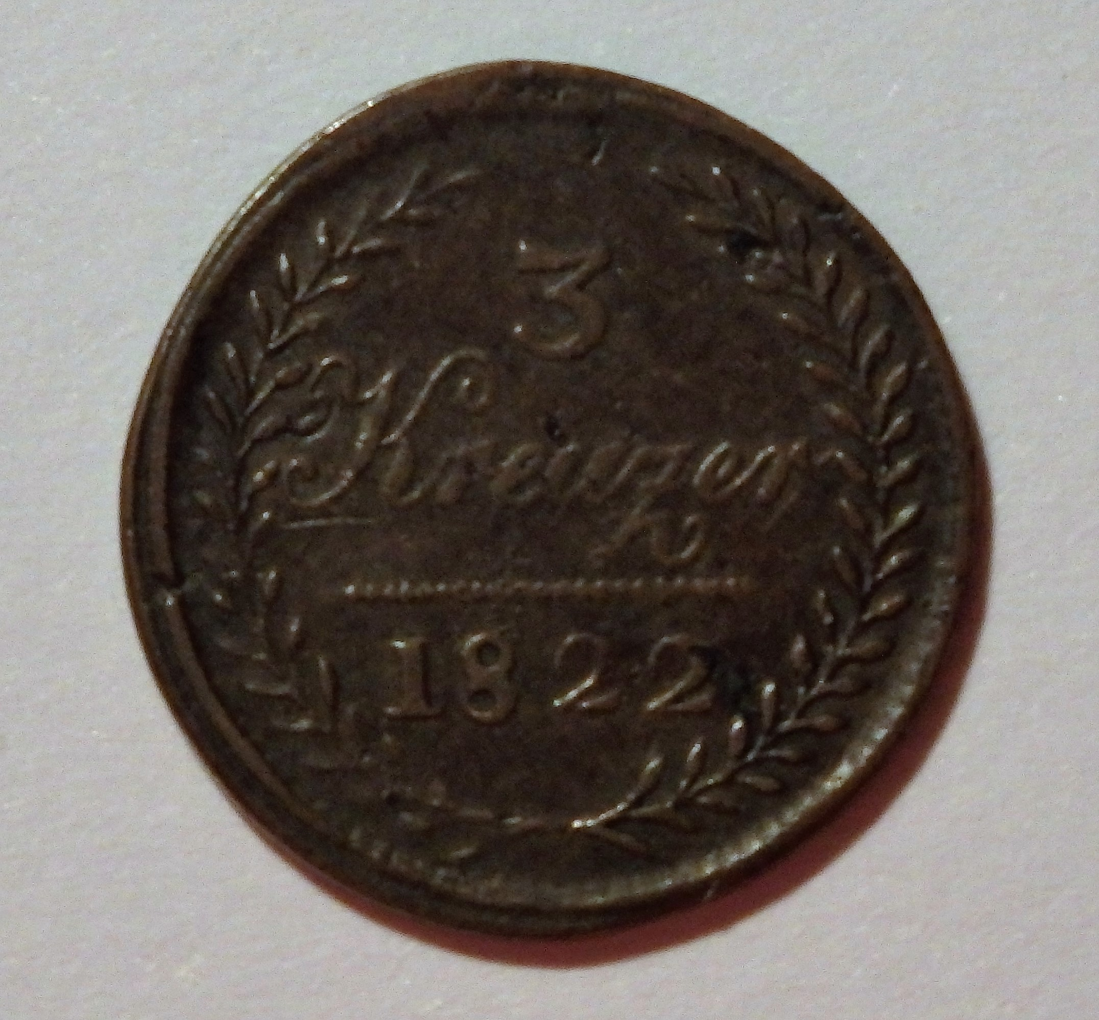 Wertseite (3 Kreuzer) Veilsdorfer Kupfermarke, Jahr 1822